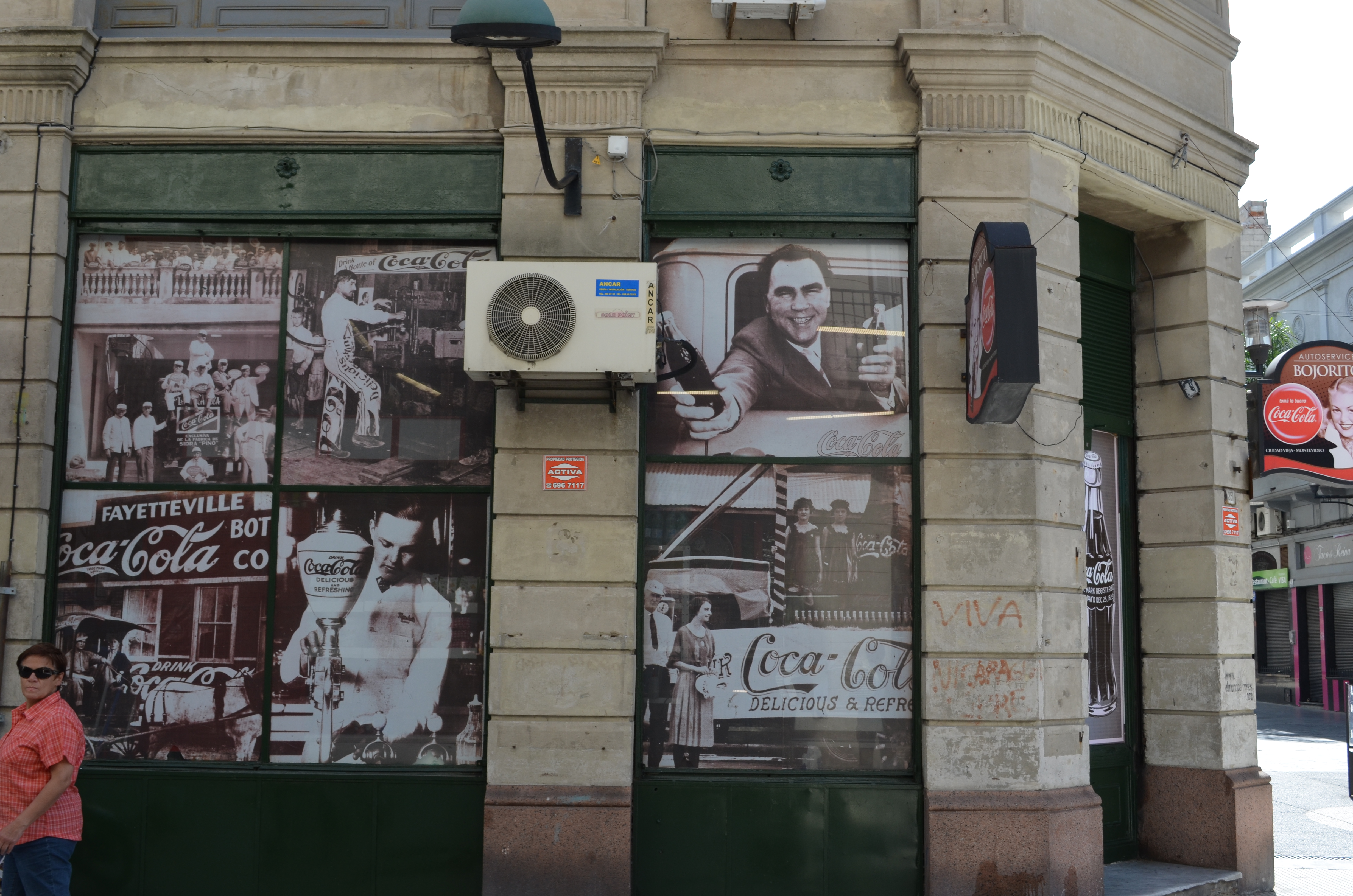 Coca-Cola Reklame u. a. mit Max Schmeling an einem Gebäude in Montevideo (2011)